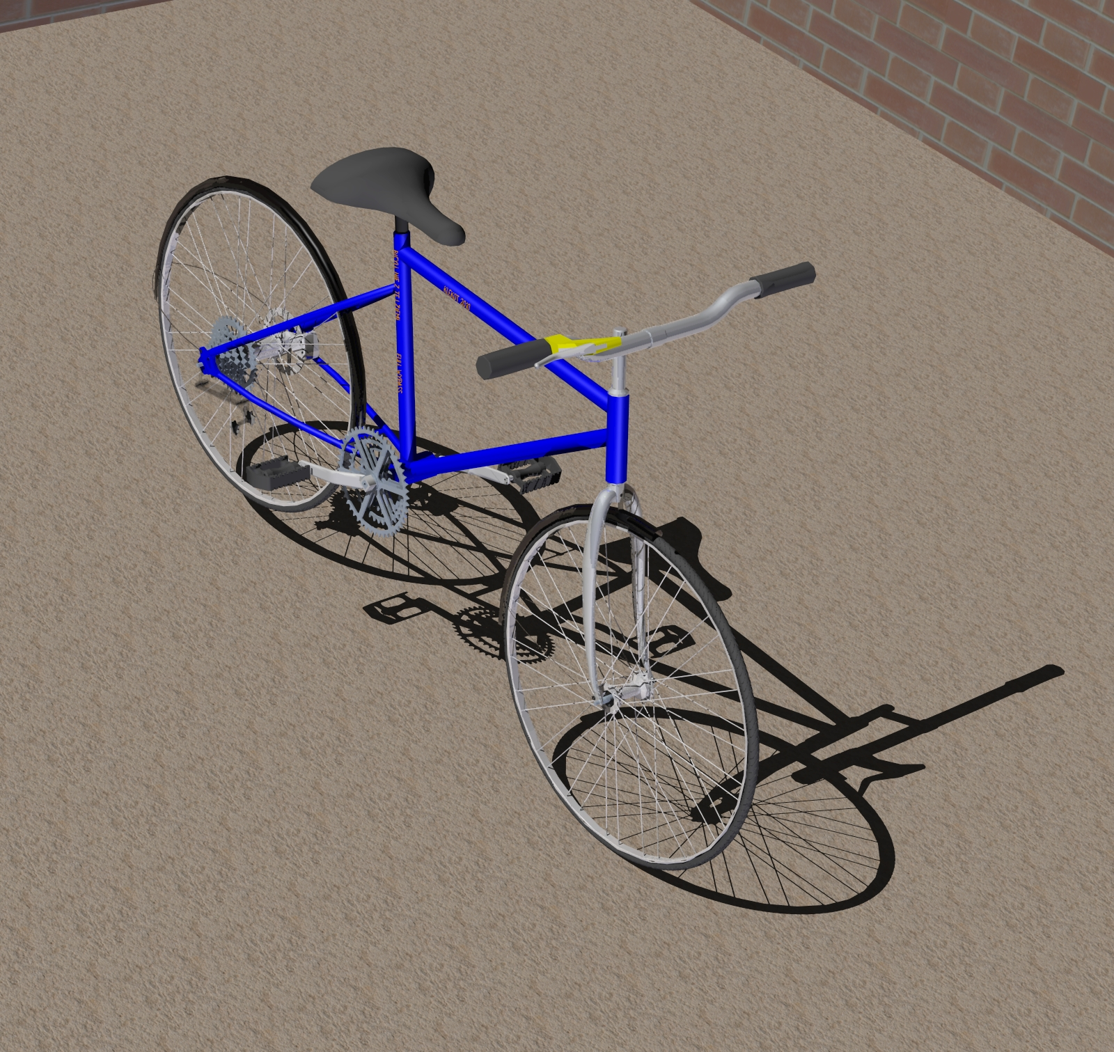 projekt renderowany w Solid Edge